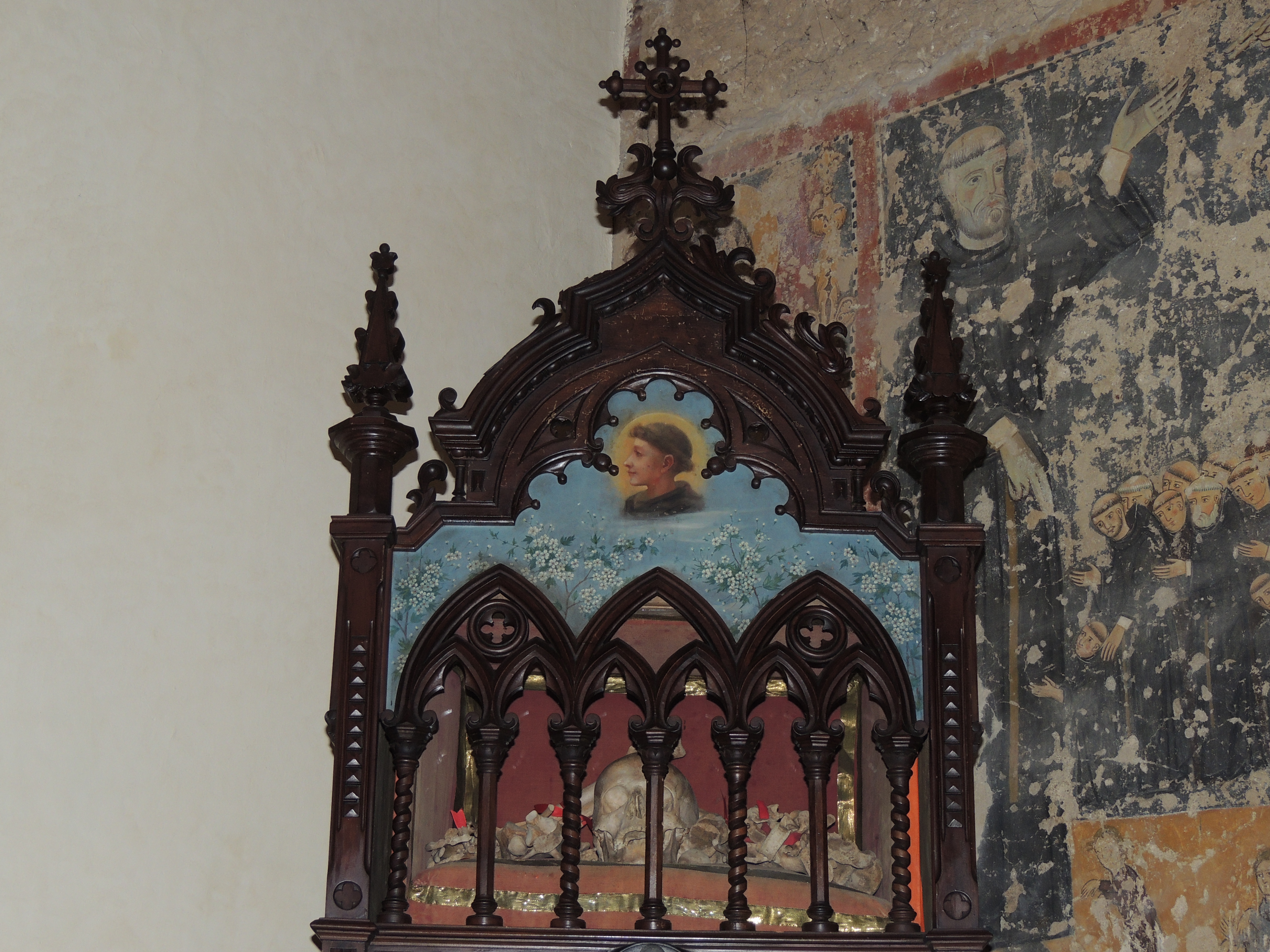 Reliquario novecentesco che ospita le spoglie del beato Giovanni da Rieti